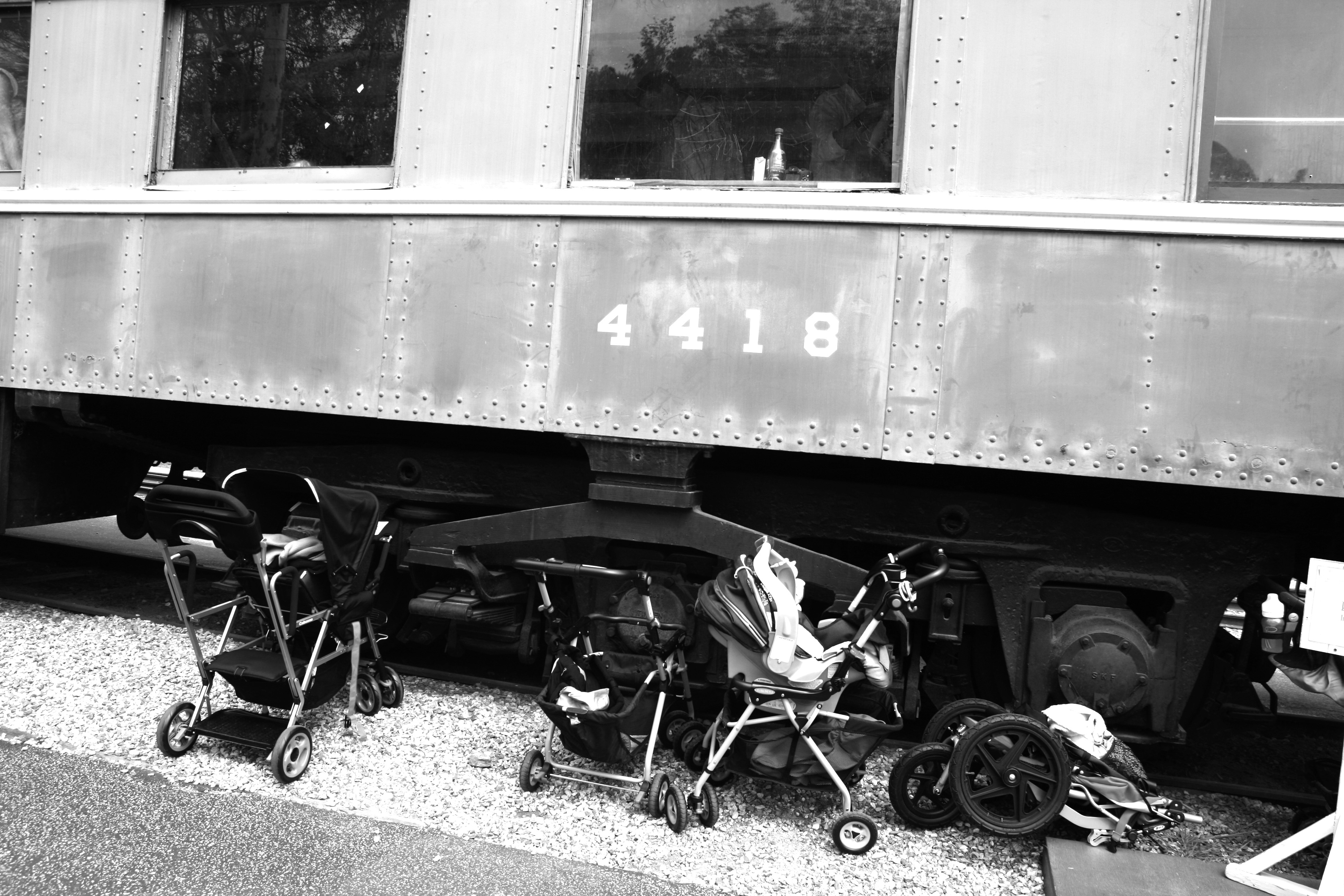 all aboard